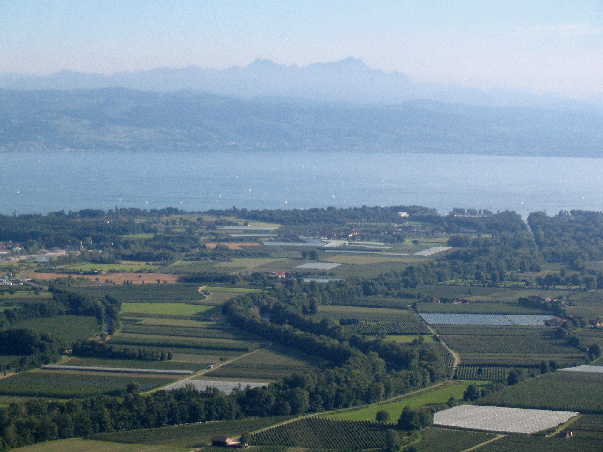 Mündung der Argen in den Boensee bei Langenargen